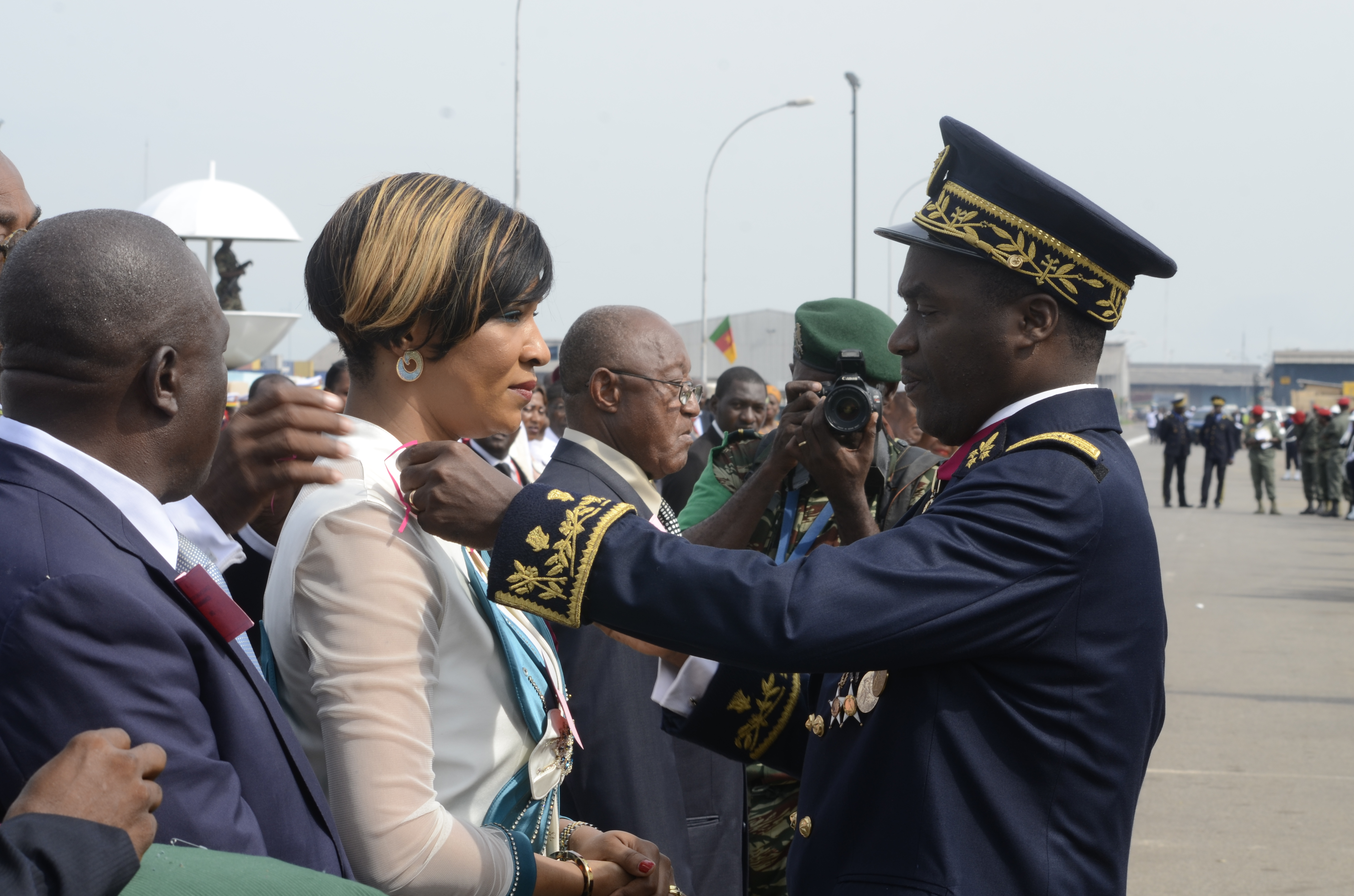 Mme Léonie Bwemba Toulou, consul honoraire de Malte au Cameroun lors d'une cérémonie de remise des distinctions honoriques par le gouverneur de la région du littoral, M. Joseph Beti Assomo.